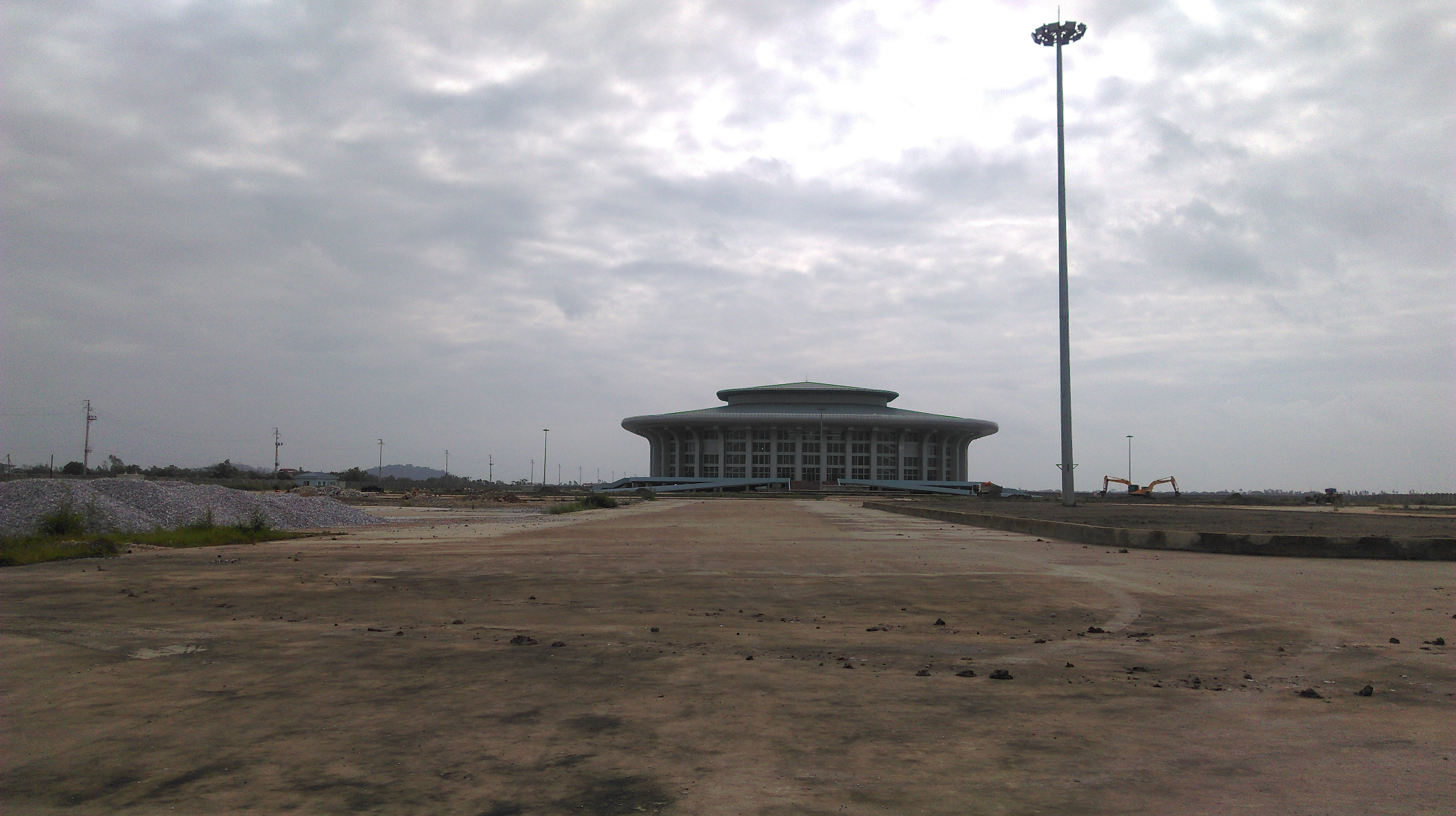 Nhà Thi đấu Hà Nam